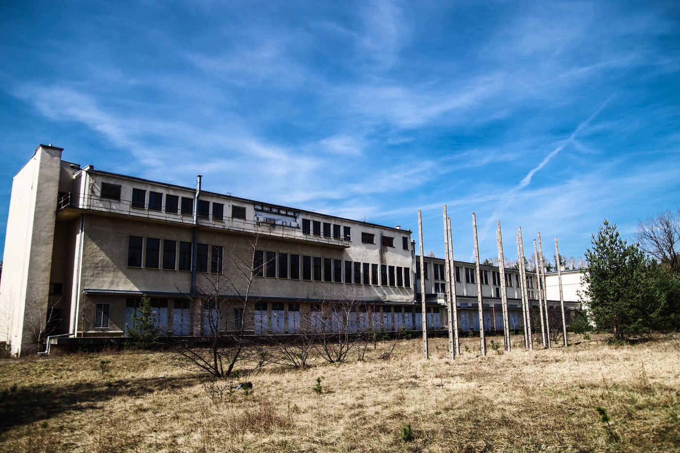 Budynek główny Radiostacji Leszczynka. Fot z 2017 r.